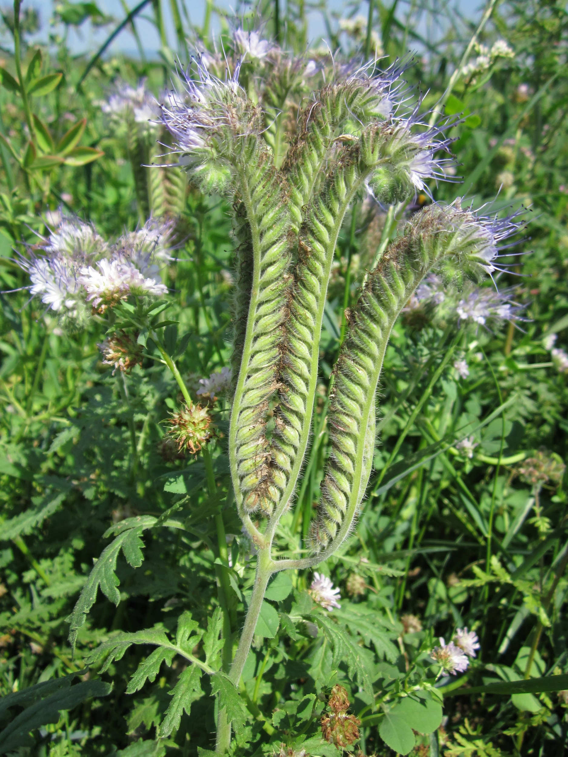 Rainfarn-Phazelie (Phacelia tanacetifolia) im Landschaftsschutzgebiet „Hockenheimer Rheinbogen“